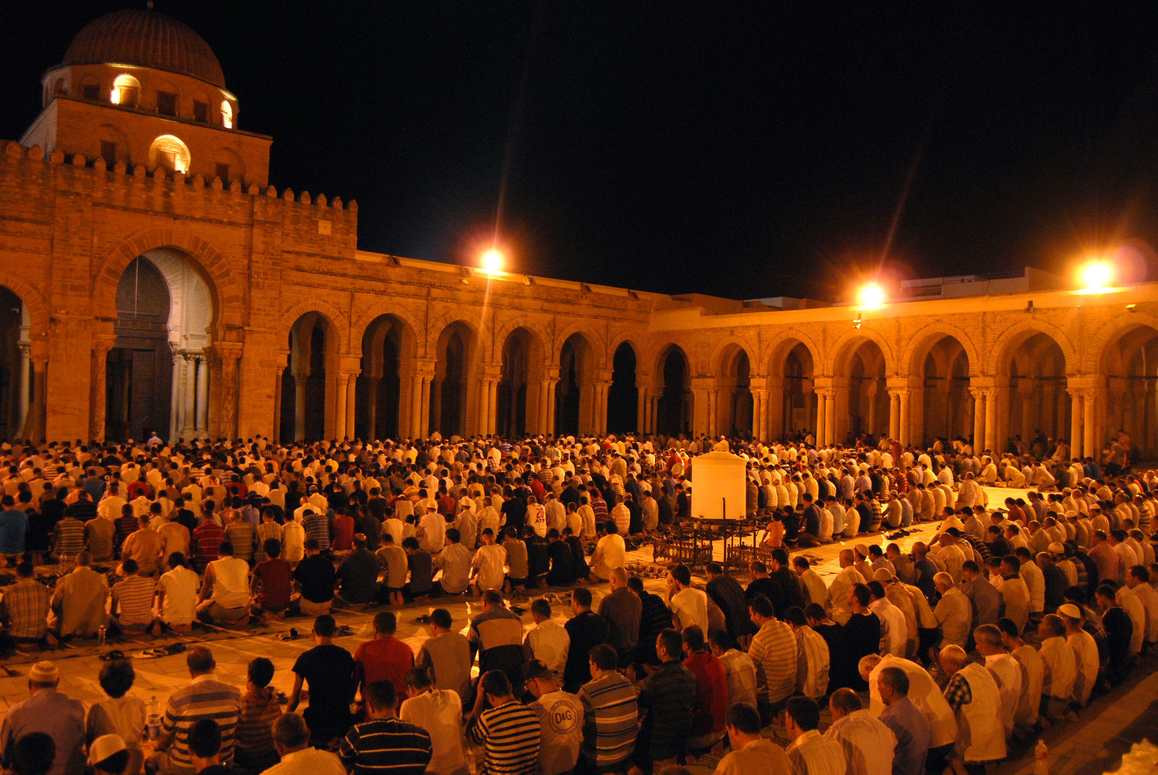 Grande Mosquée (Sidi Okba), Kairouan. Fidèles accomplissant la prière de Tarawih dans la cour de la Grande Mosquée de Kairouan.